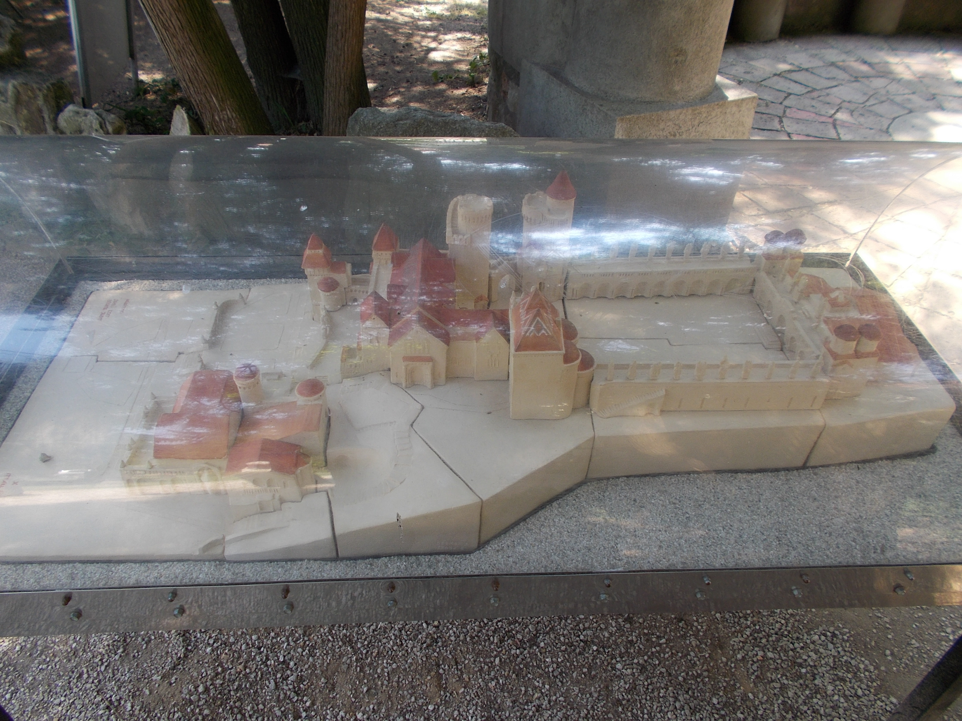 Bory vár. Makett. - Magyarország, Fejér megye, Székesfehérvár, Öreghegy, Máriavölgy út 54